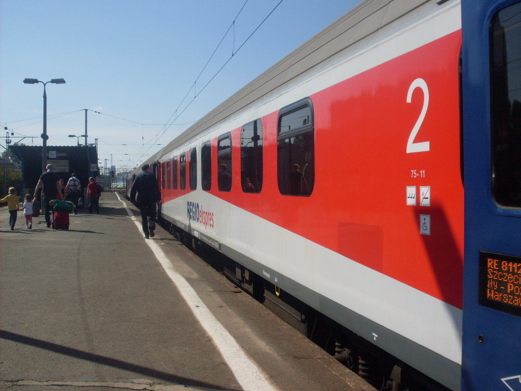 Wagon typu 161A (modernizacja wagonu 111A)